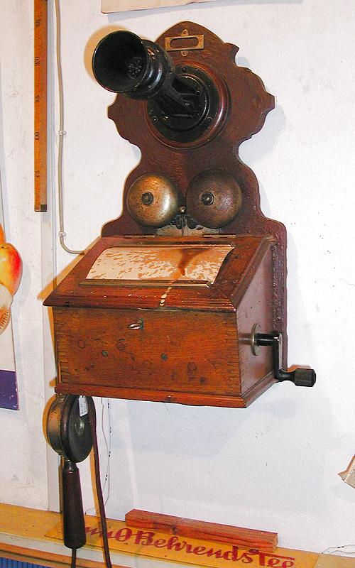 Historisches Telefon Motiv: Kurbeltelefon im Historischen Kaufhaus - "nicht zu schnell kurbeln, sonst wird der Beamte geschädigt." Foto: Wilfried Wittkowsky, 2005